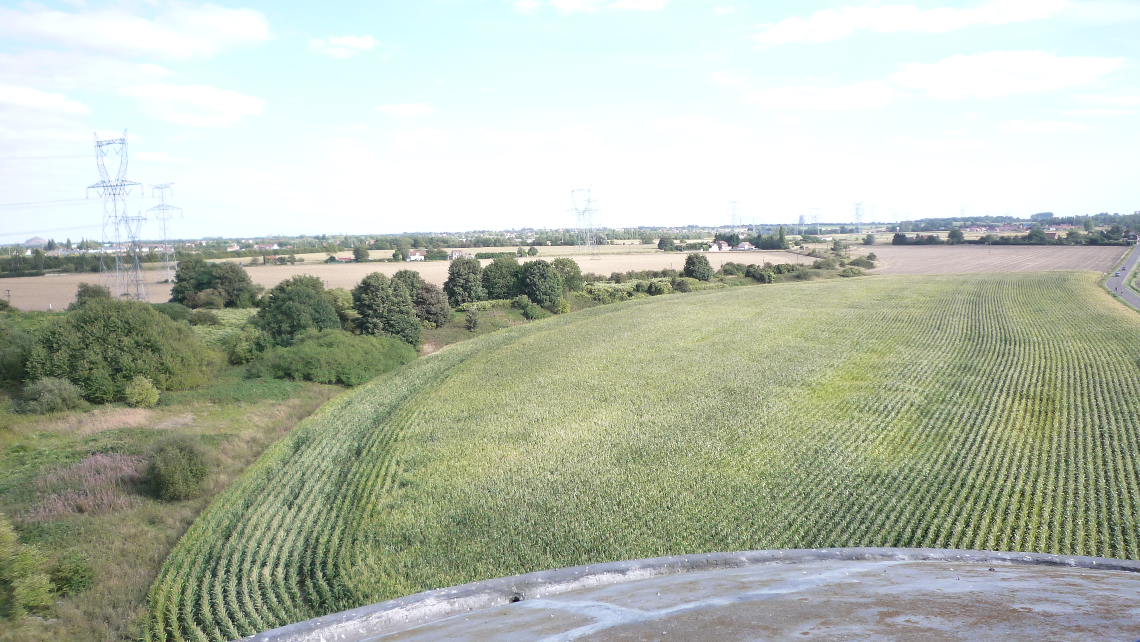 Gare de triage de Somain, Nord, Nord-Pas-de-Calais, France. Photo prise depuis le sommet de l'ancien château d'eau.